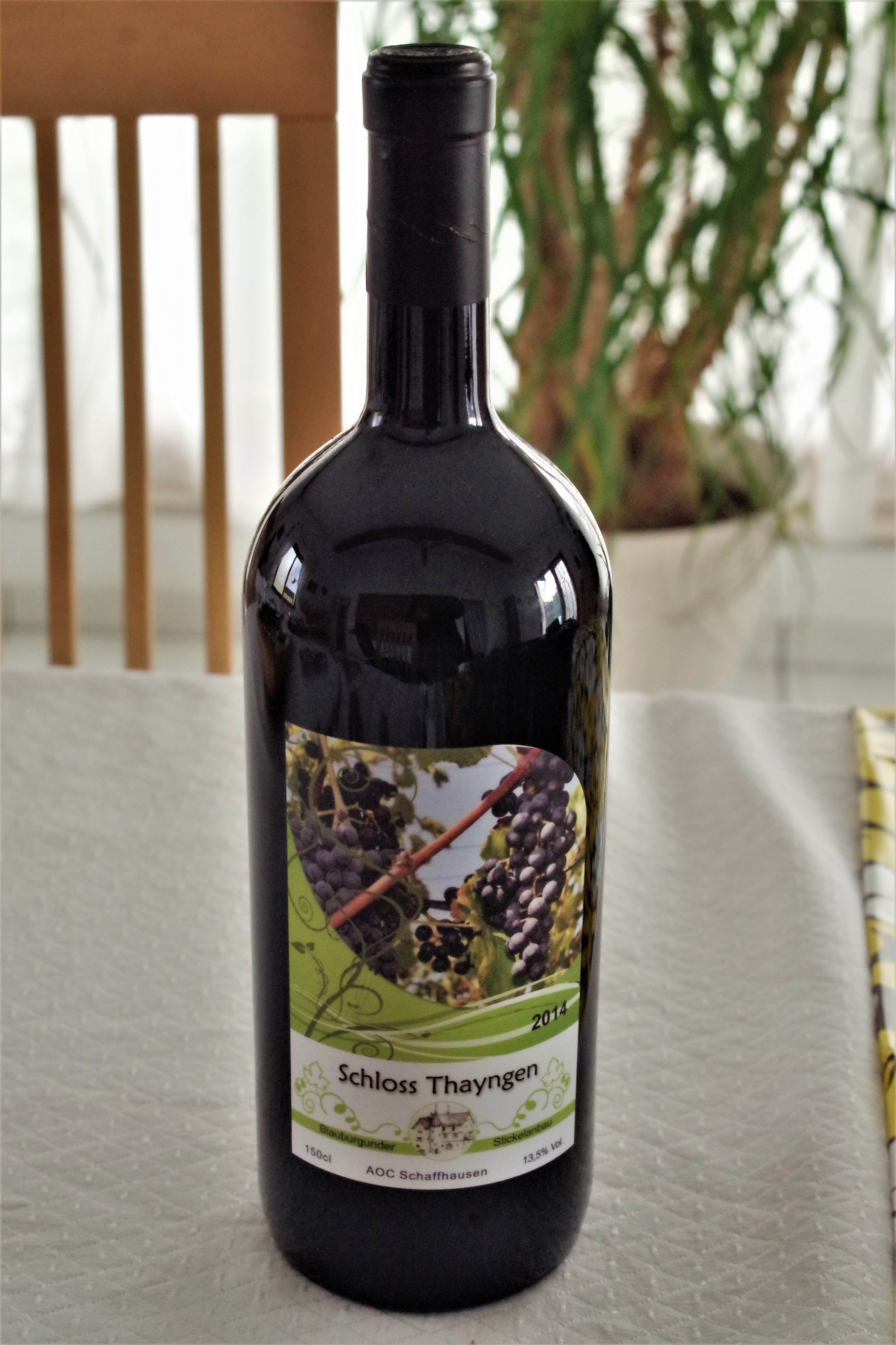 Bariqueausgebauter Blauburgunderwein von der Schlosshalde Thayngen